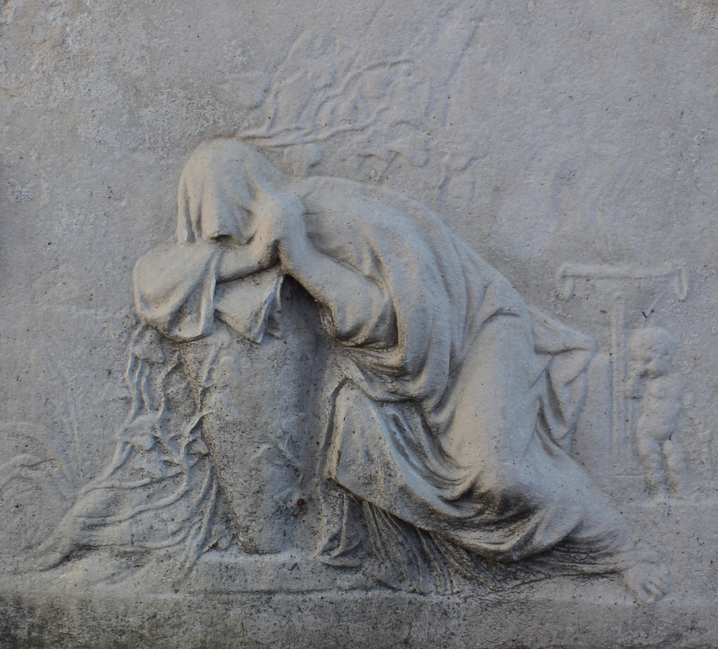 Cénotaphe d'Antoine de Guillaume-Lagrange (1781-1807), dite tombe du Dragon. Monument élevé par sa mère, à la mémoire de son fils, dragon, mort en Pologne. Stèle ornée au recto d'un médaillon représentant le Antoine de Guillaume-Lagrange, d'un sabre et d'une carabine sculptés ainsi qu'une allégorie de la douleur. Au verso figure une épitaphe. Il s'agit de la première sculpture du cimetière. détail, face avant